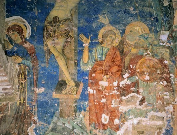 Dietisalvi di Speme. Crucifixion. Siena Cathedral